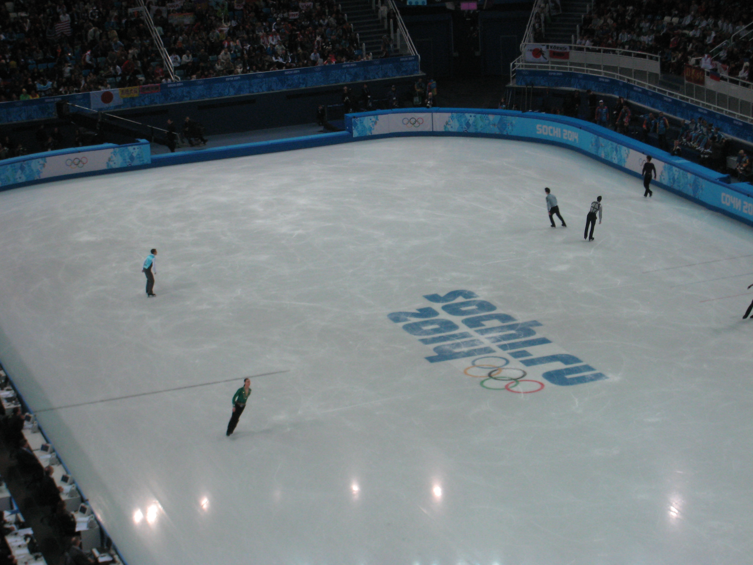 Последняя разминка в соревнованиях мужчин (произвольная программа) на Зимних Олимпийских играх 2014 в Сочи